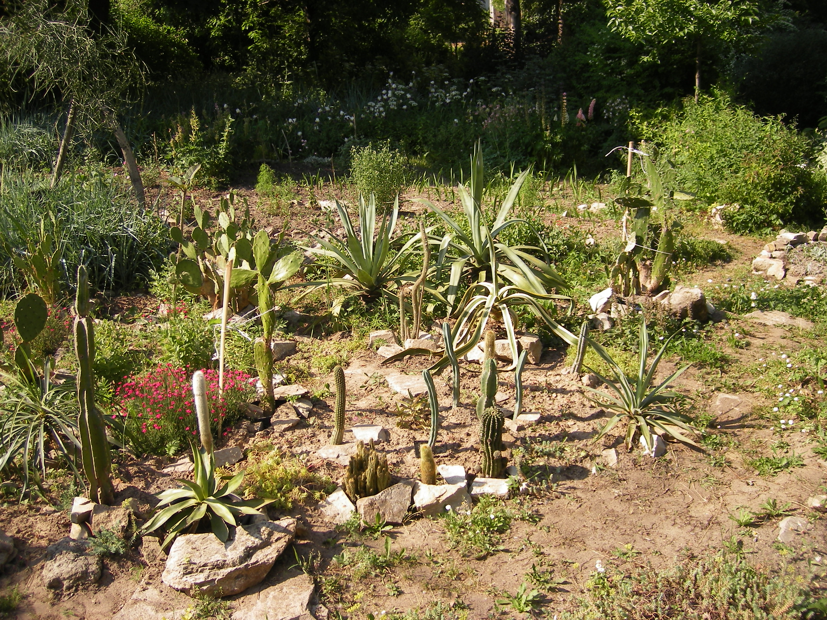 Mexican garden / Мексиканский сад